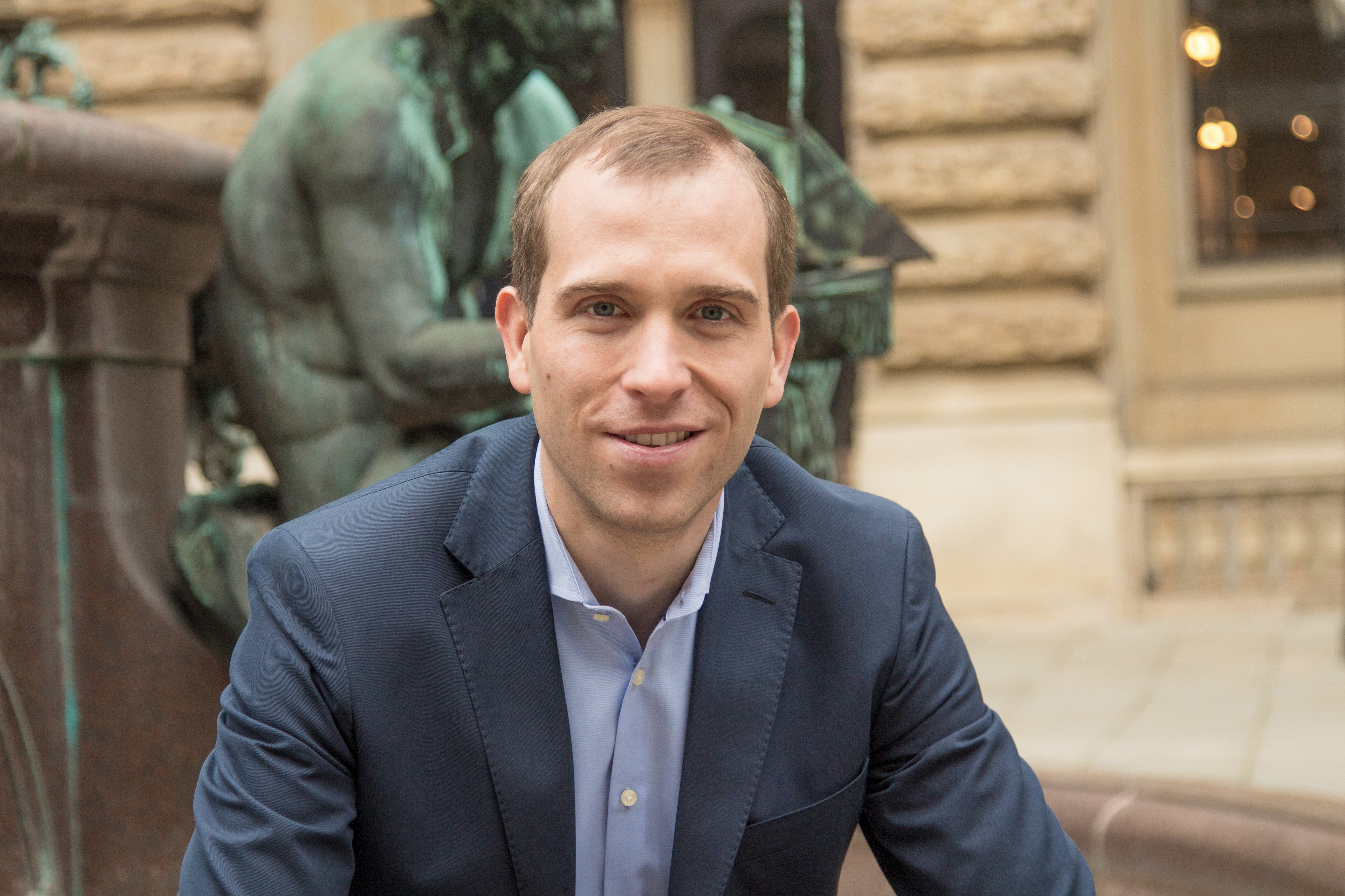 Dennis Thering im Innenhof des Hamburger Rathauses